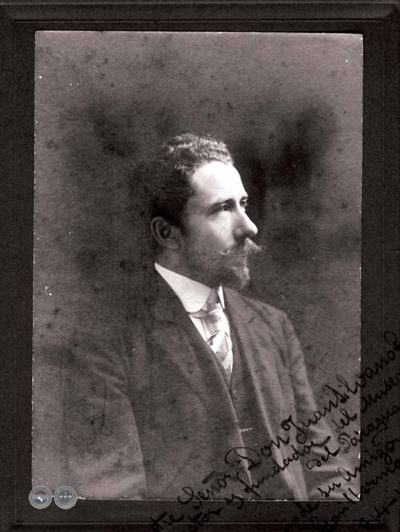 Retrato fotográfico do pintor italiano Guillermo Da Re